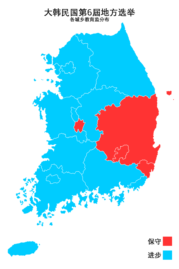 大韩民国第6届地方选举，各城乡教育监分布（简体中文版）